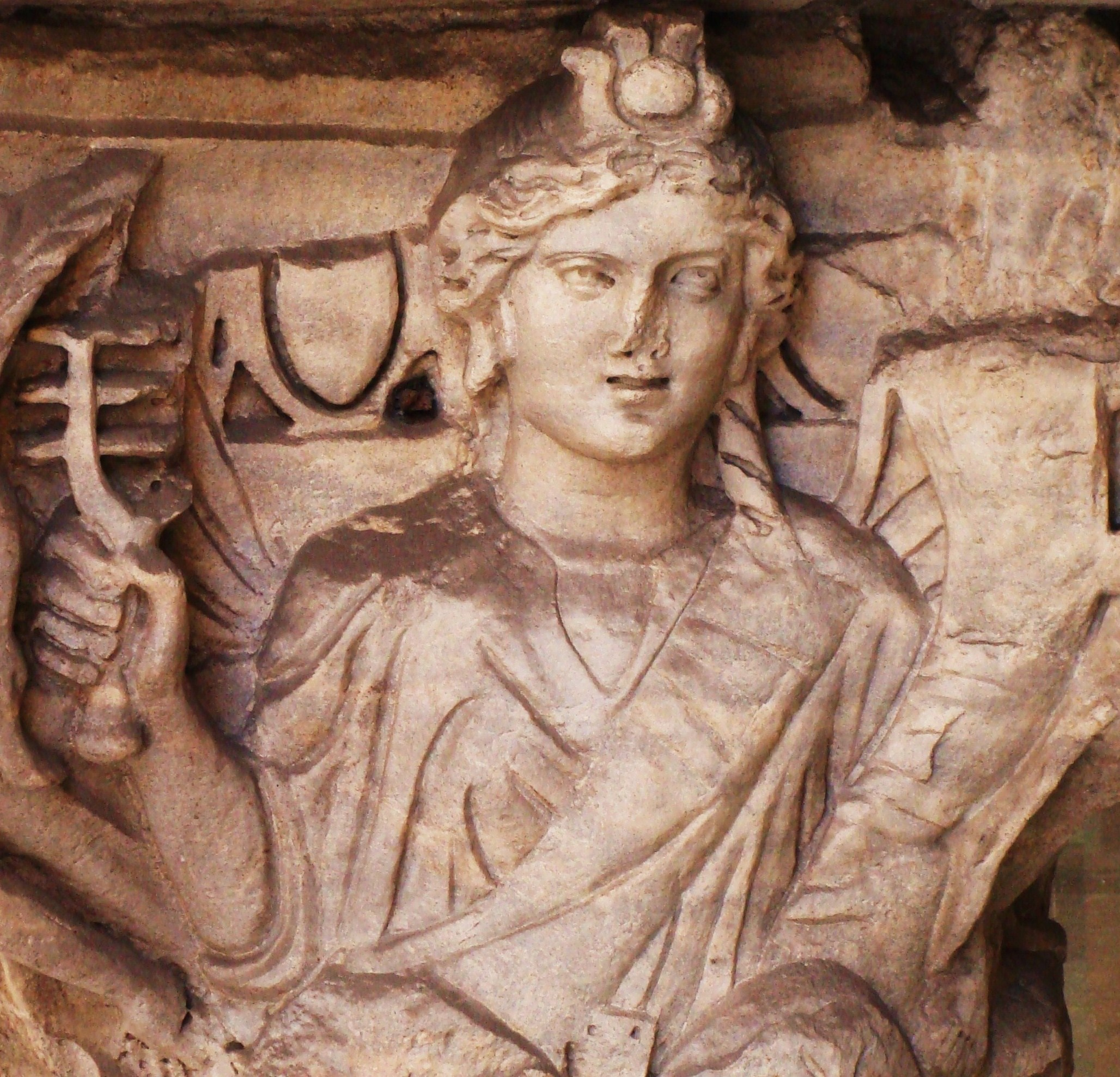 Chapiteau en marbre représentant la déesse Isis tenant un sistre. Epoque sévérienne, Pise (Italie).